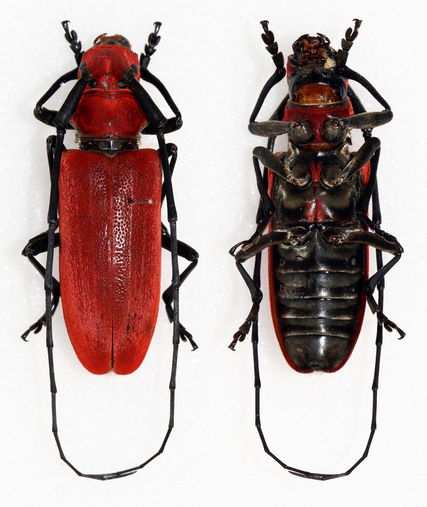 Breuning,1968 Sex: Male Data: 05-2014 - Tam Dao NP - Vinh Phuc Prov - 1000m - North Vietnam Size: 28.5mm